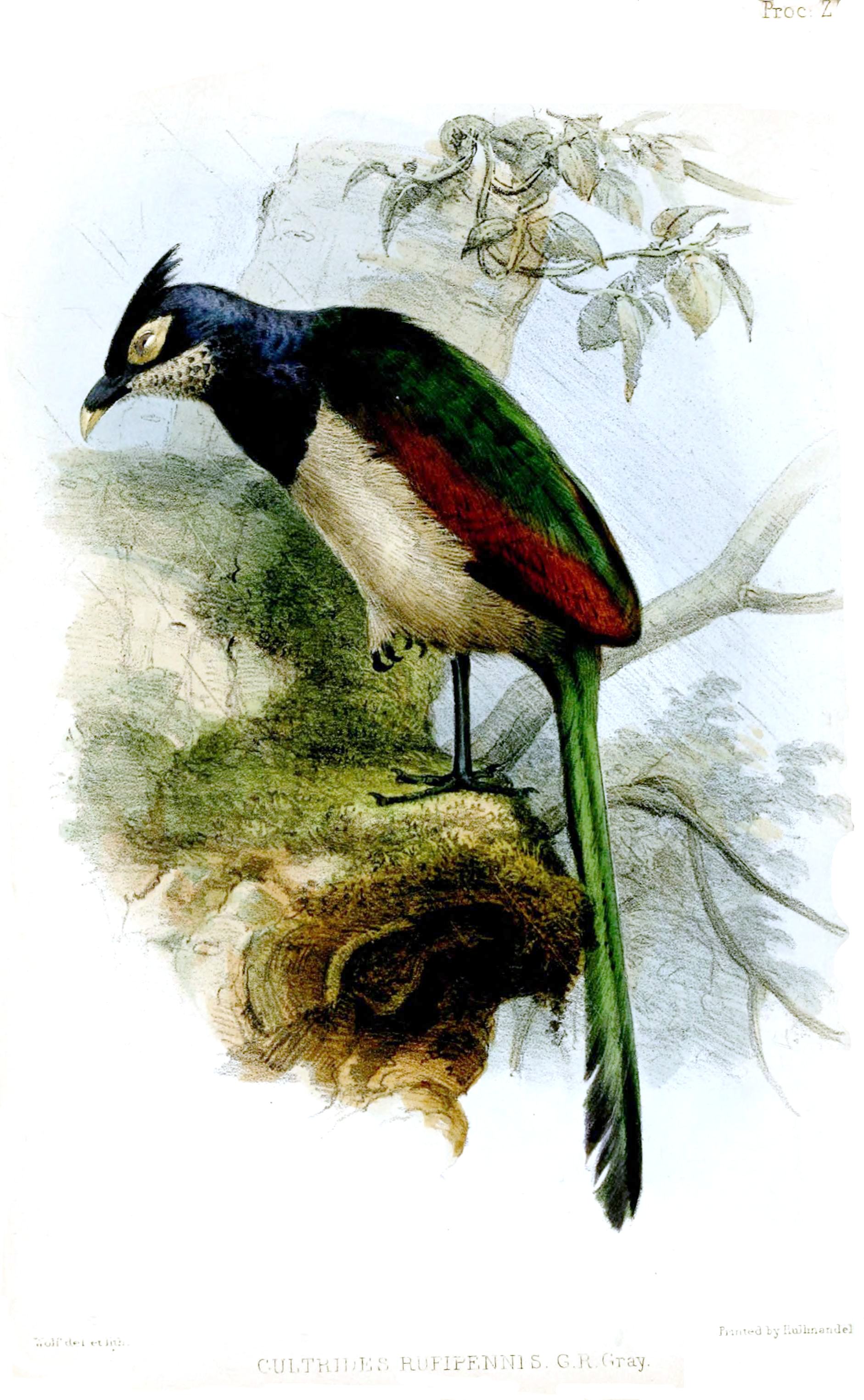 Cultrides rufipennis = Neomorphus rufipennis